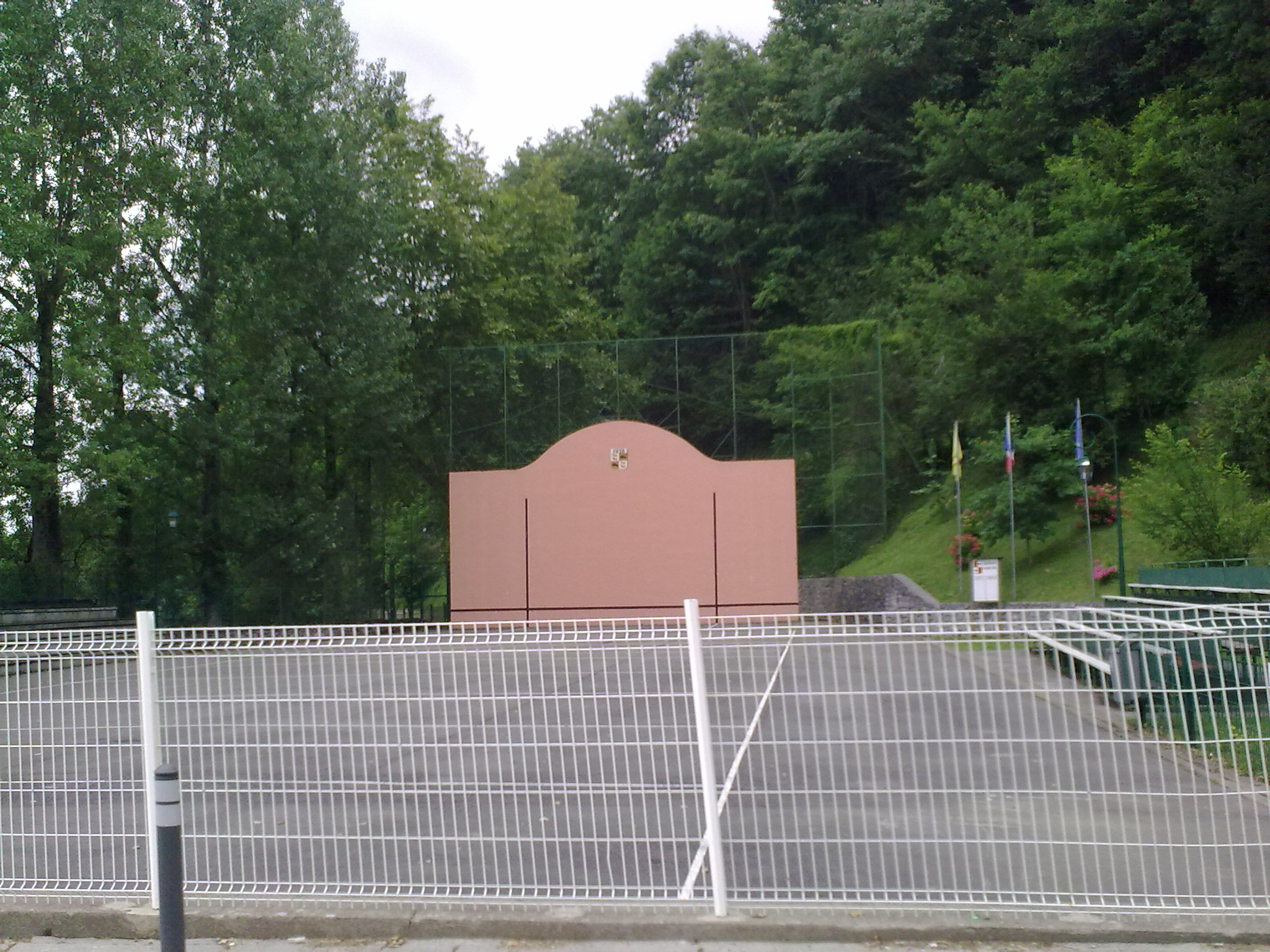 Arette le 4 juillet 2010.